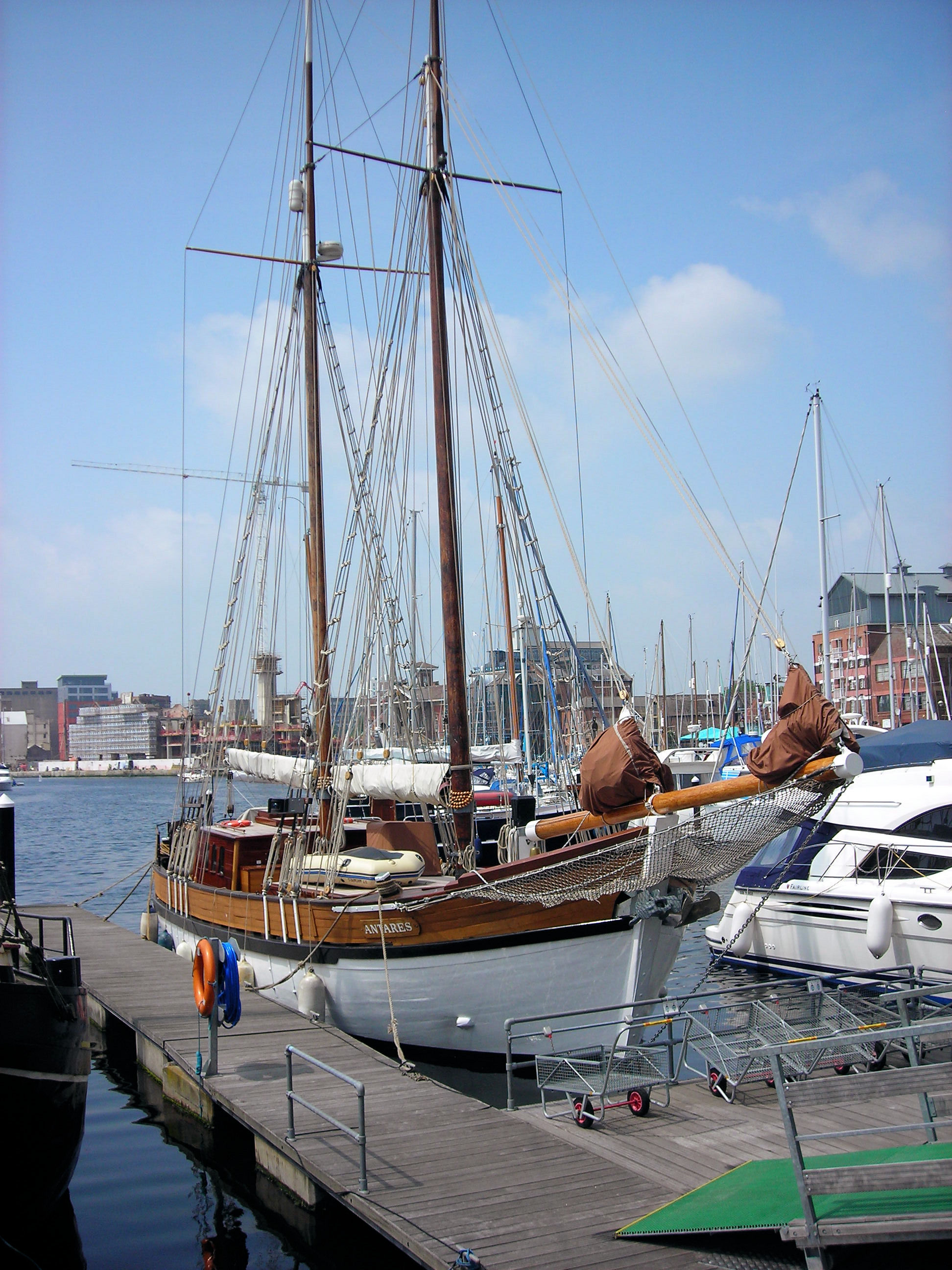 Yacht Antares in Ipswich Marina Suffolk 12 June 2007